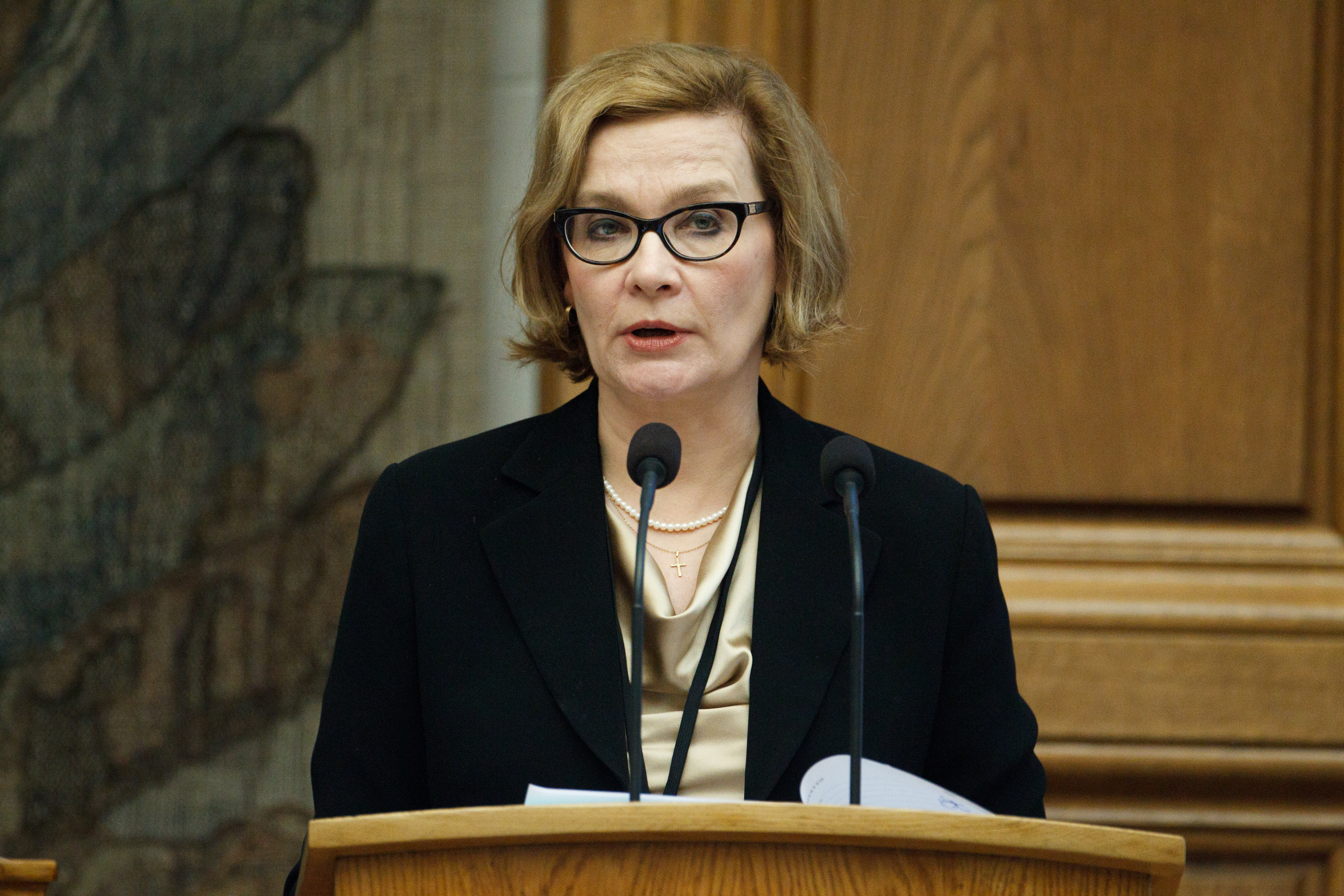 Paula Risikko vid Nordiska Rådets session 2011 i Köpenhamn.